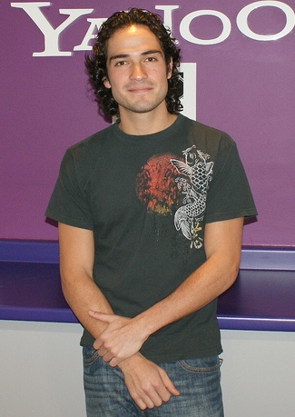 Poncho Herrera en Yahoo! México.